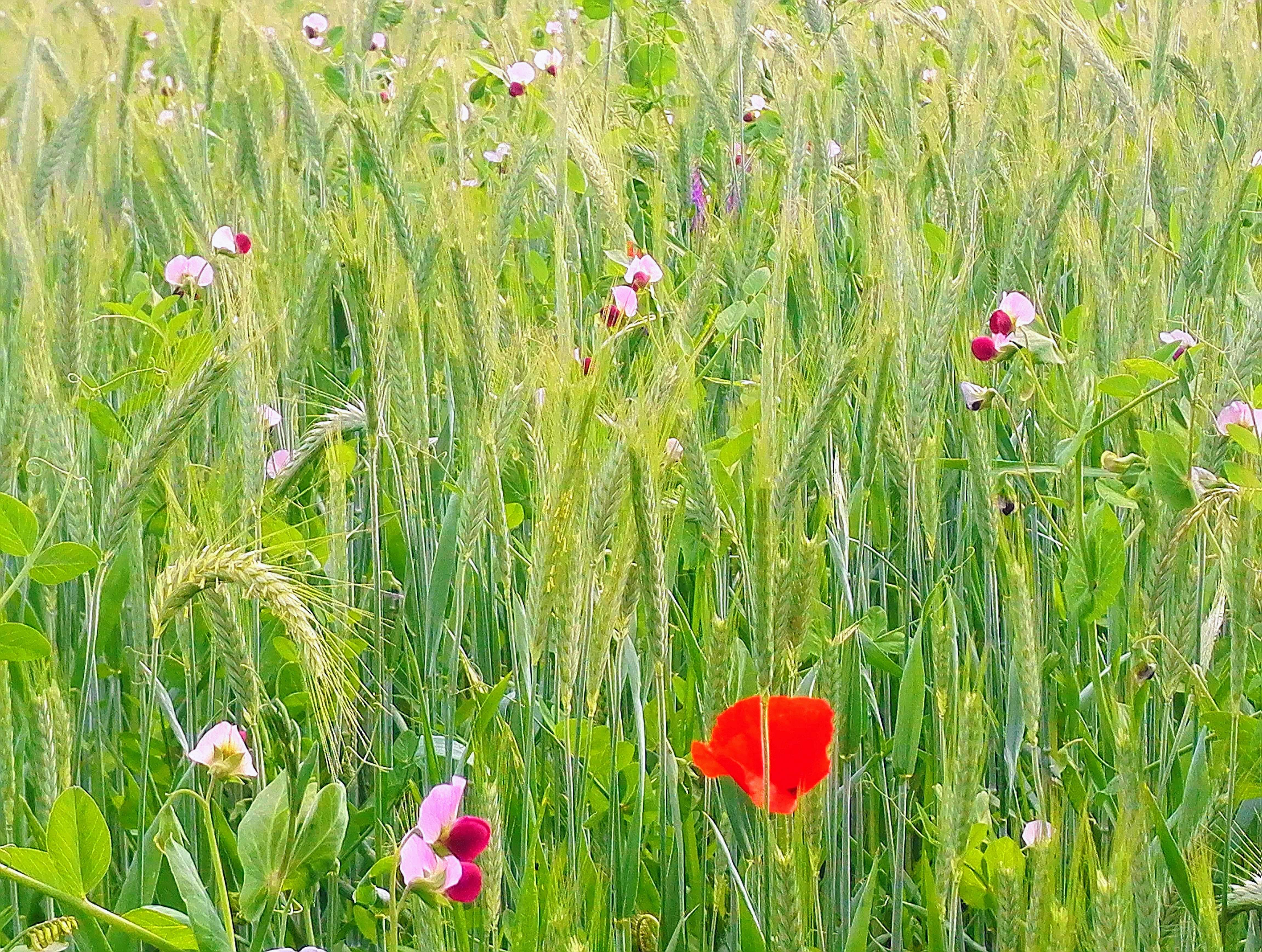 Meteil graminee - legumineuse (vesce) en agriculture biologique - France Vosges 20180526 RC